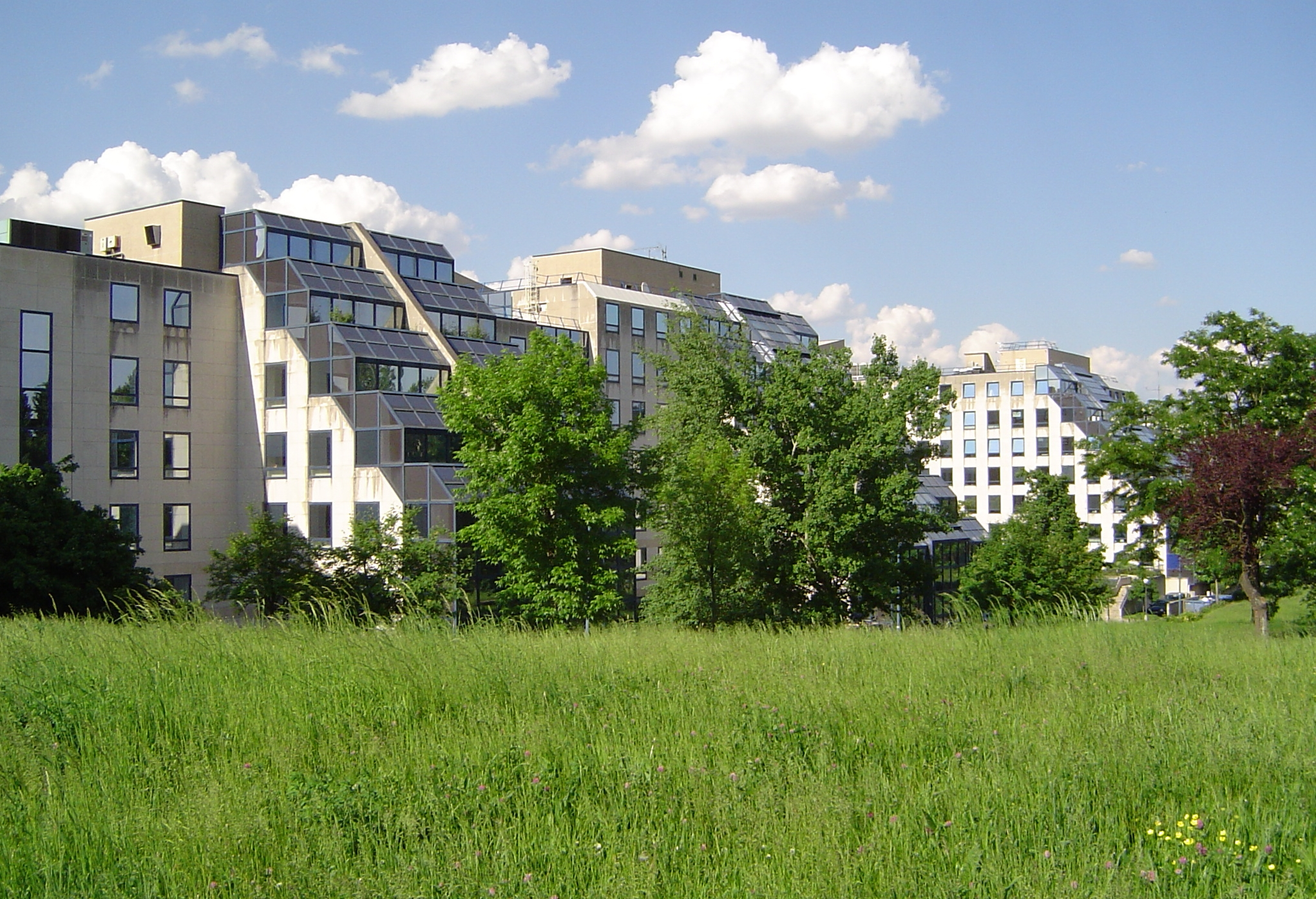 Antony